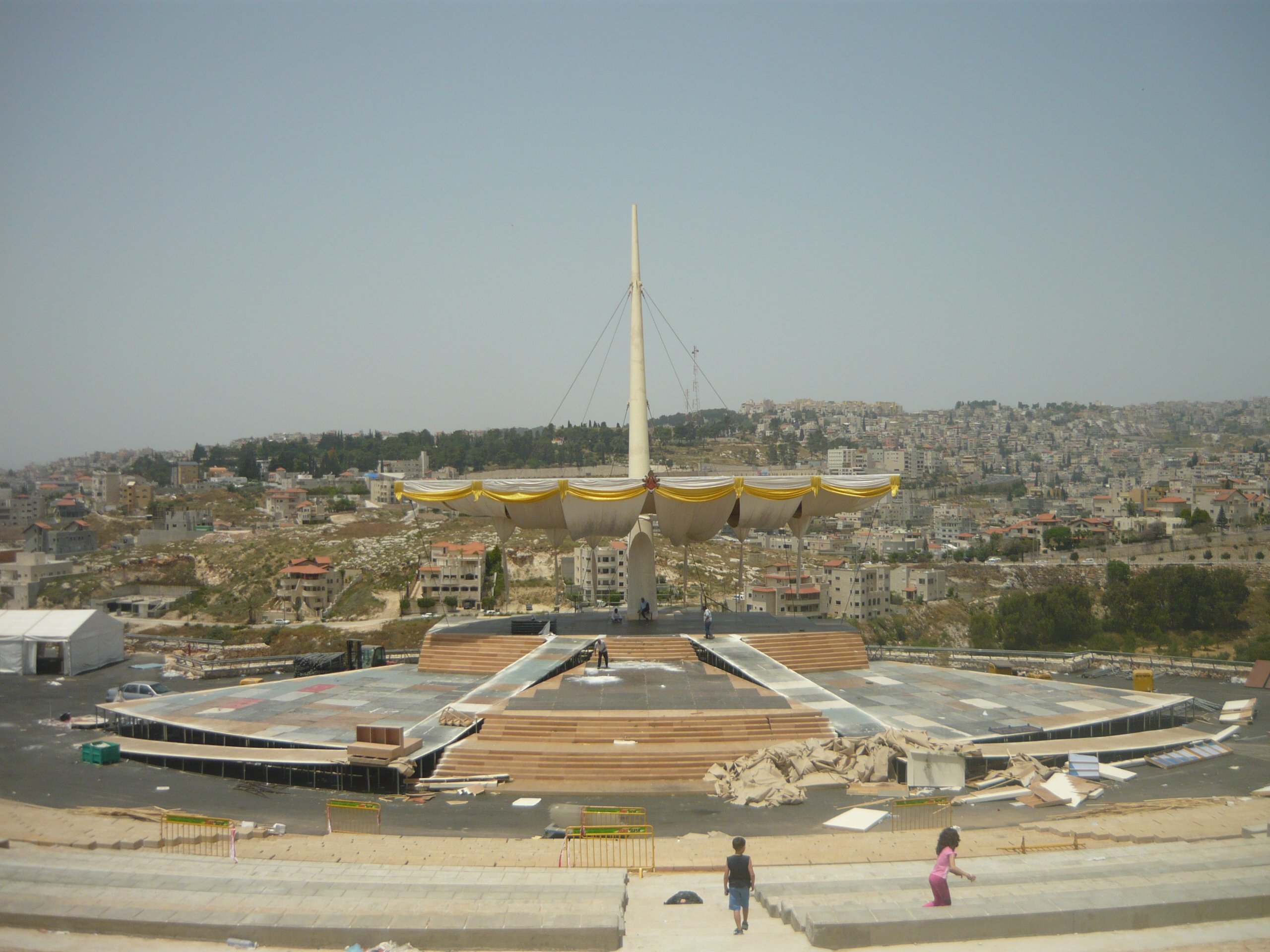 The stage on mount precipice from which benedictus 16th gave mass הבמה בהר הקפיצה בנצרת ממנה האפיפיור נתן את המיסה